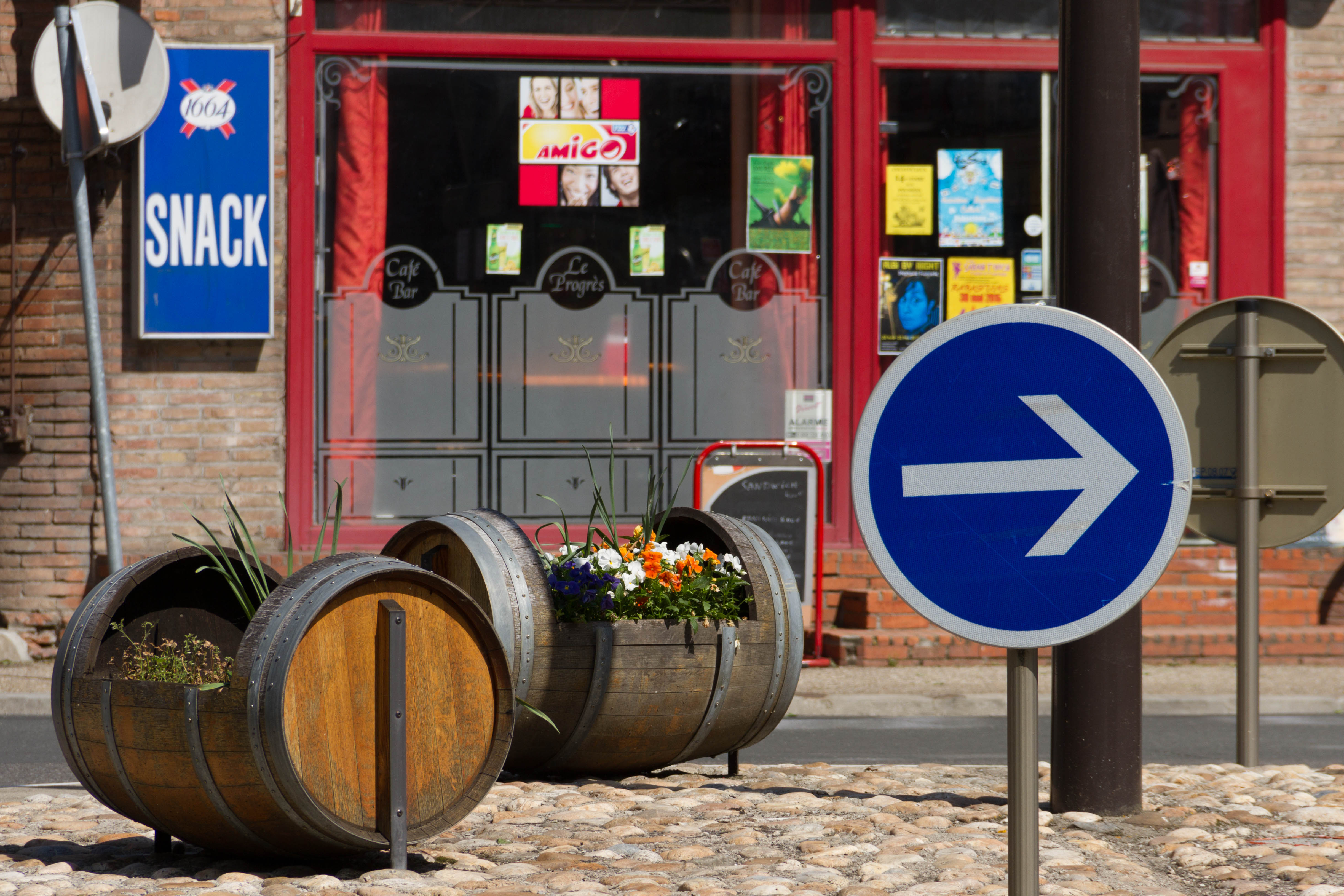 Rabastens